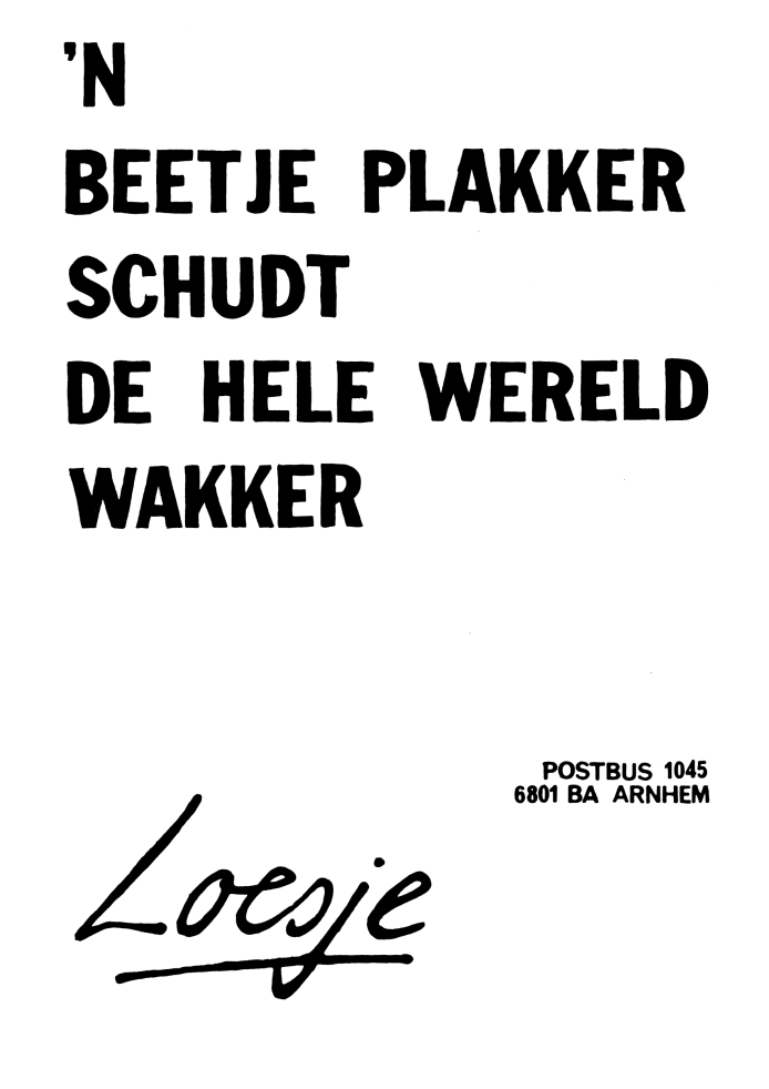 Nederlandse Loesje Poster